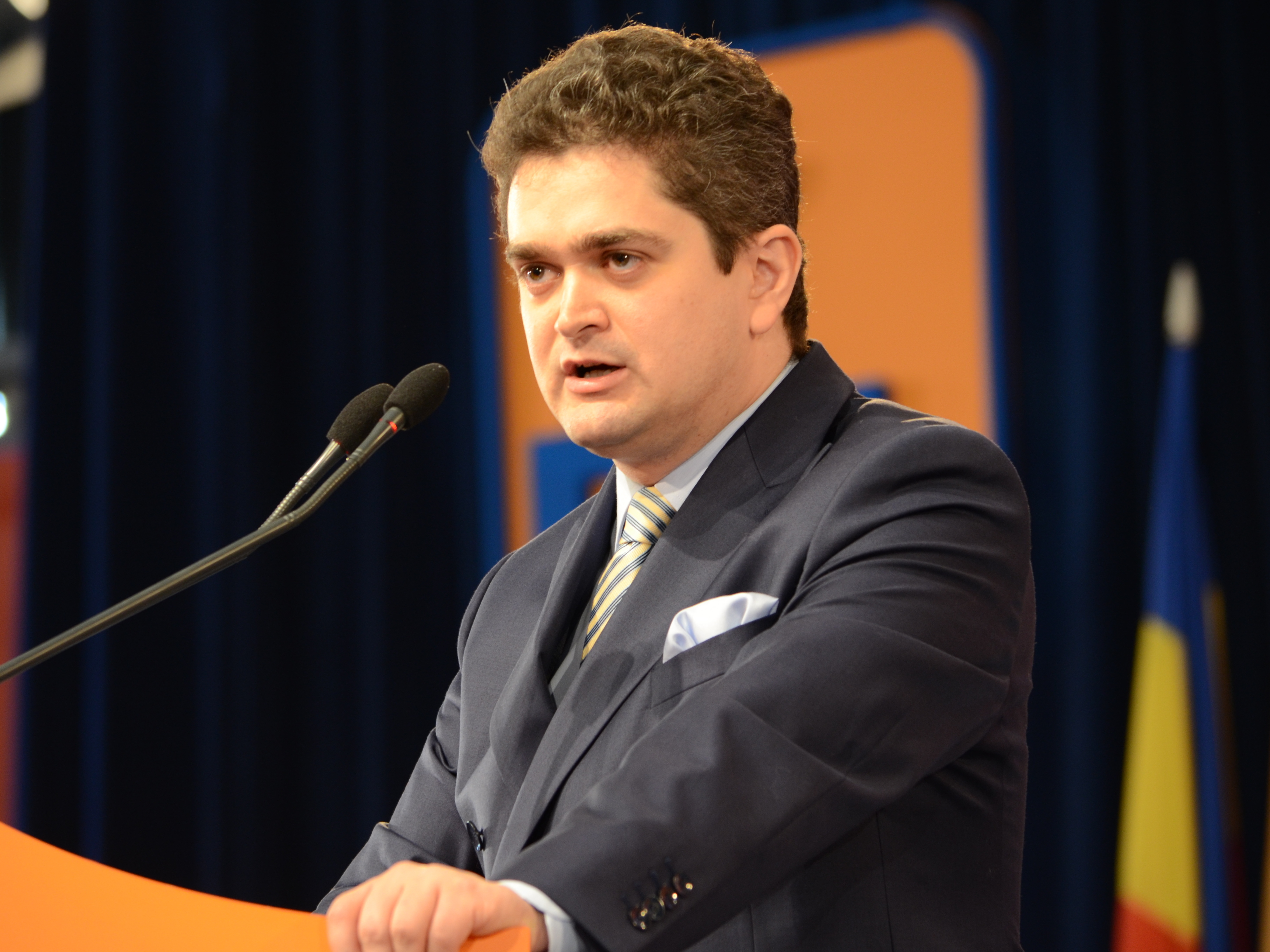 Theodor Paleologu (la Convenția națională extraordinară a Partidului Democrat-Liberal, 23 martie 2013)